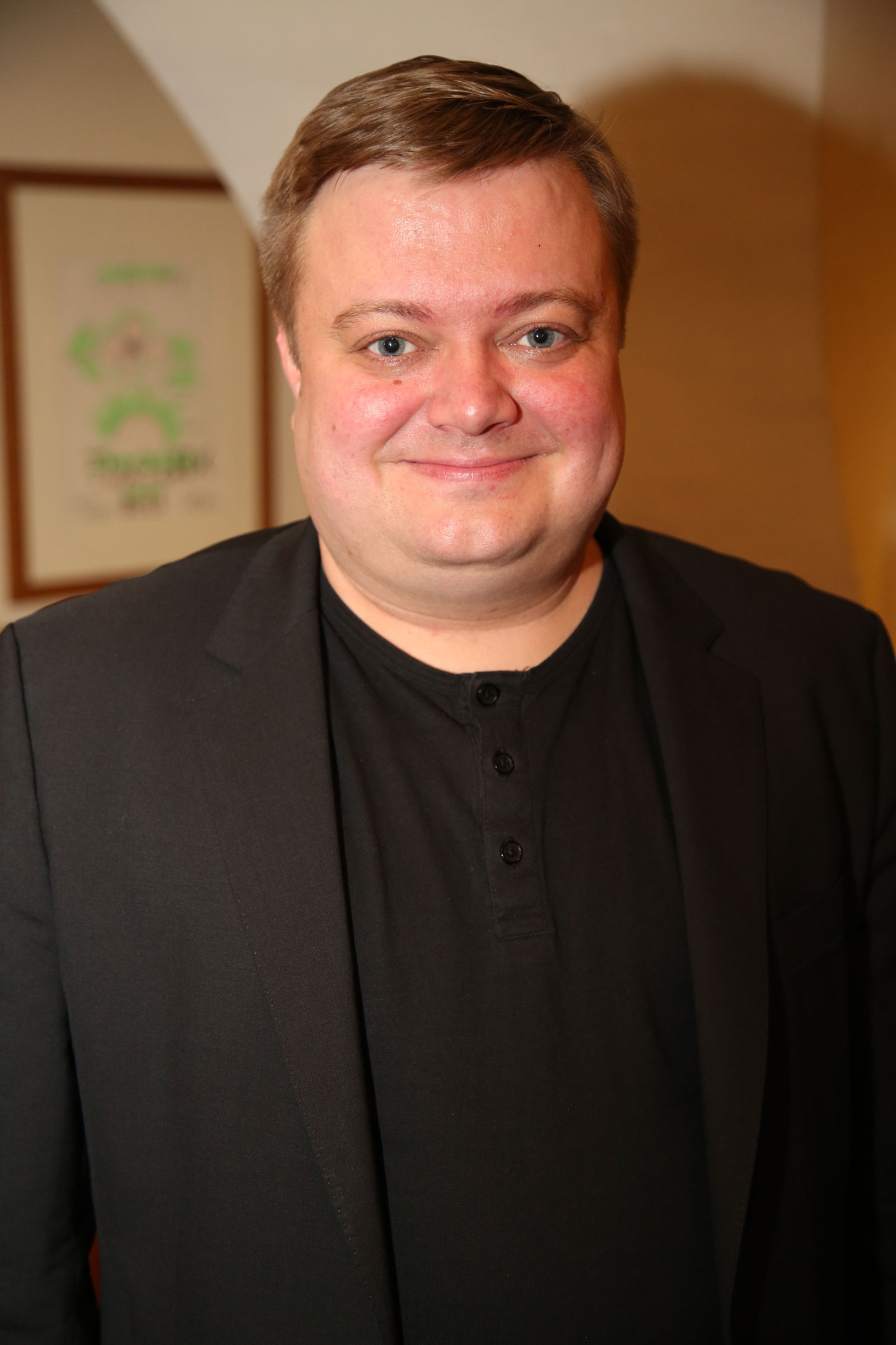 Franck.Mikko-150401-6163